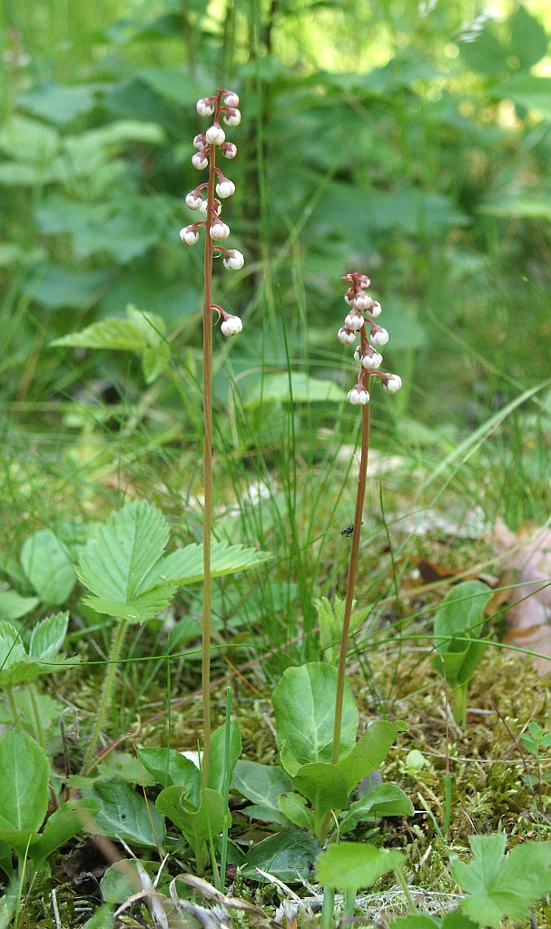 Pyrola minor, Schwäbisch-Fränkischer Wald, Germany